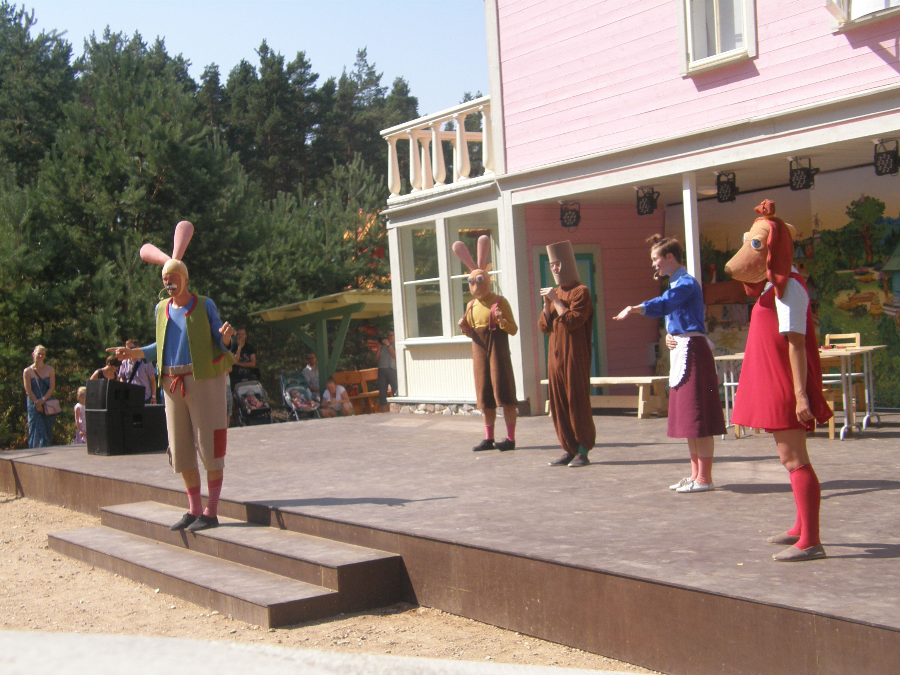 Lottemaa etendus.